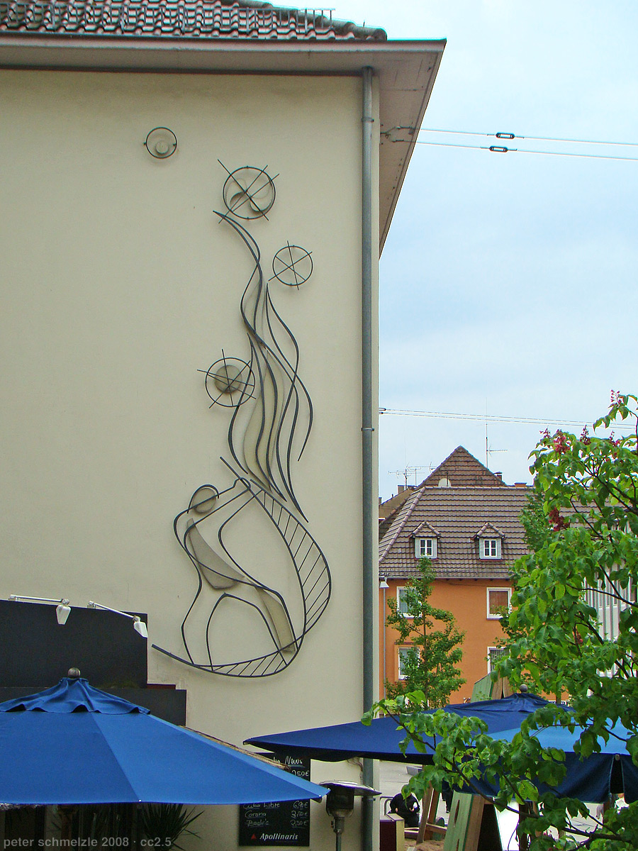 Kunst am Bau von Walter Maisak an einem Haus beim Theater in Heilbronn